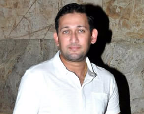 Ajit Agarkar at 'Lai Bhaari' screening